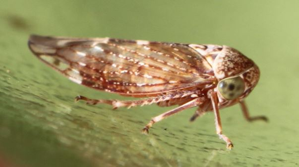 Ribaut-Winkerzikade (Acericerus ribauti), Weibchen, am 25. Oktober 2019 an einer Platane in Walldorf/Baden